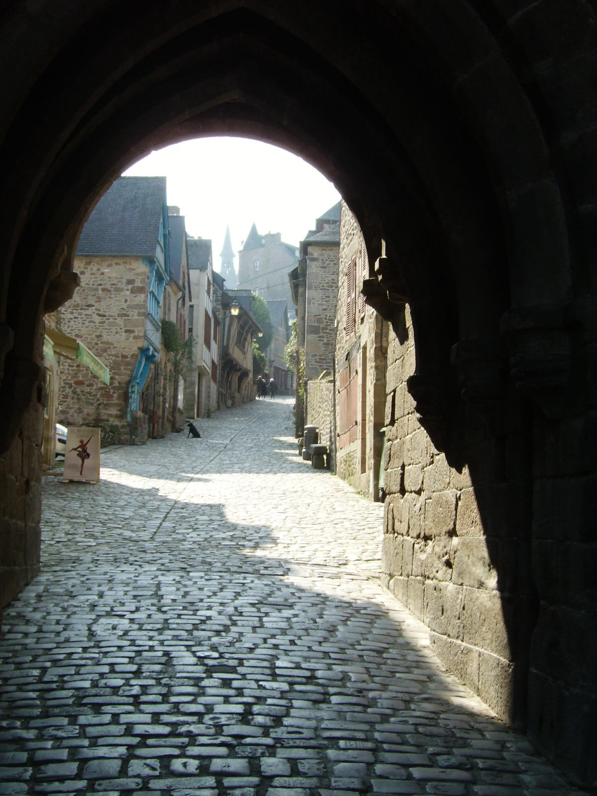 Strato de Jerzual vidita tra la pordego samnoma en Dinan (Francio)